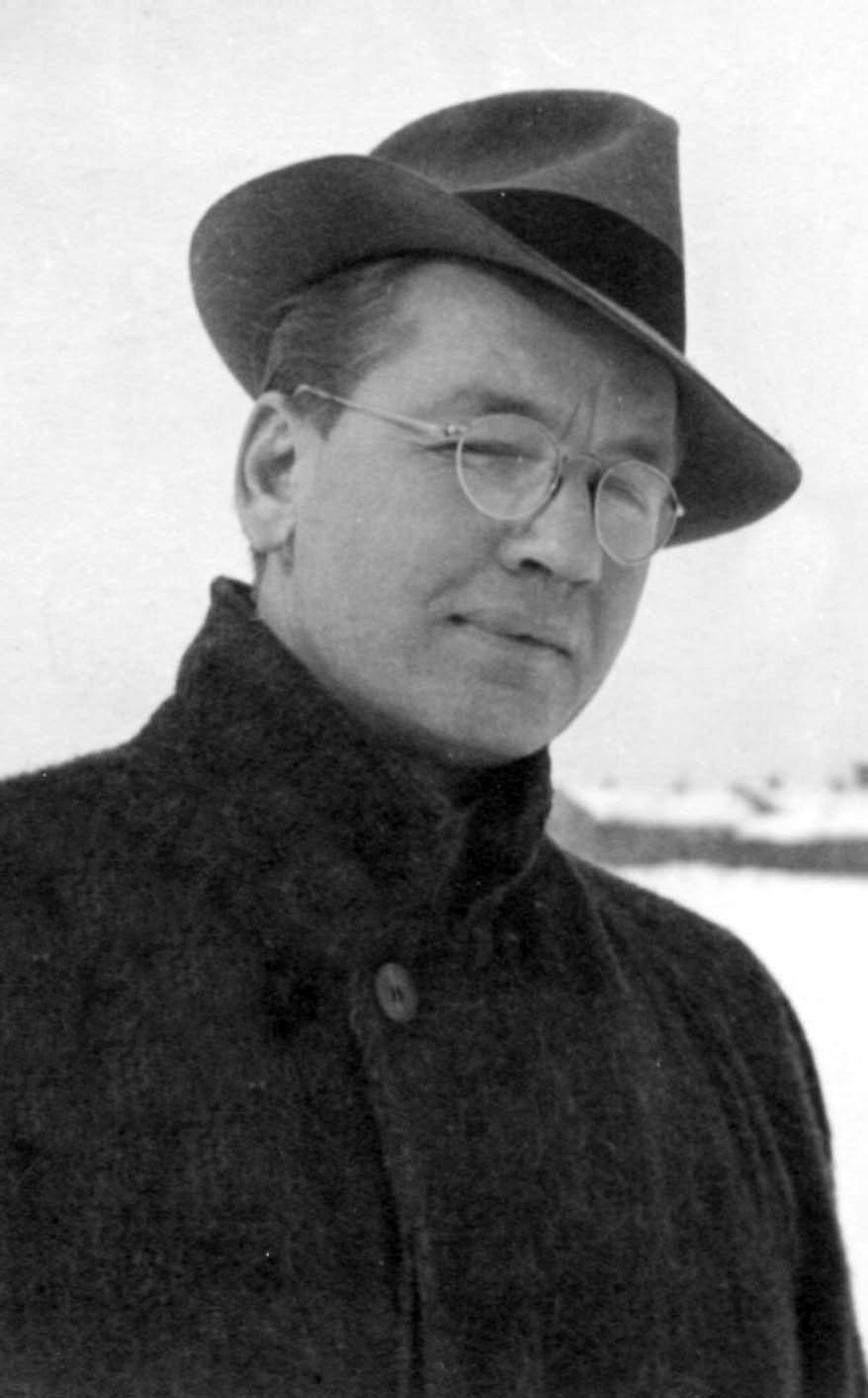 Jan Drozd, spisovatel